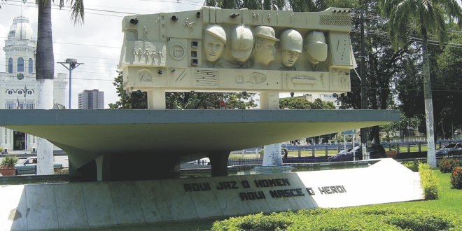 Escultura em cimento e concreto o monumento localizada na Praça do Derby. Possui abaixo os dizeres: "Aqui jaz o homem, aqui nasce o herói."